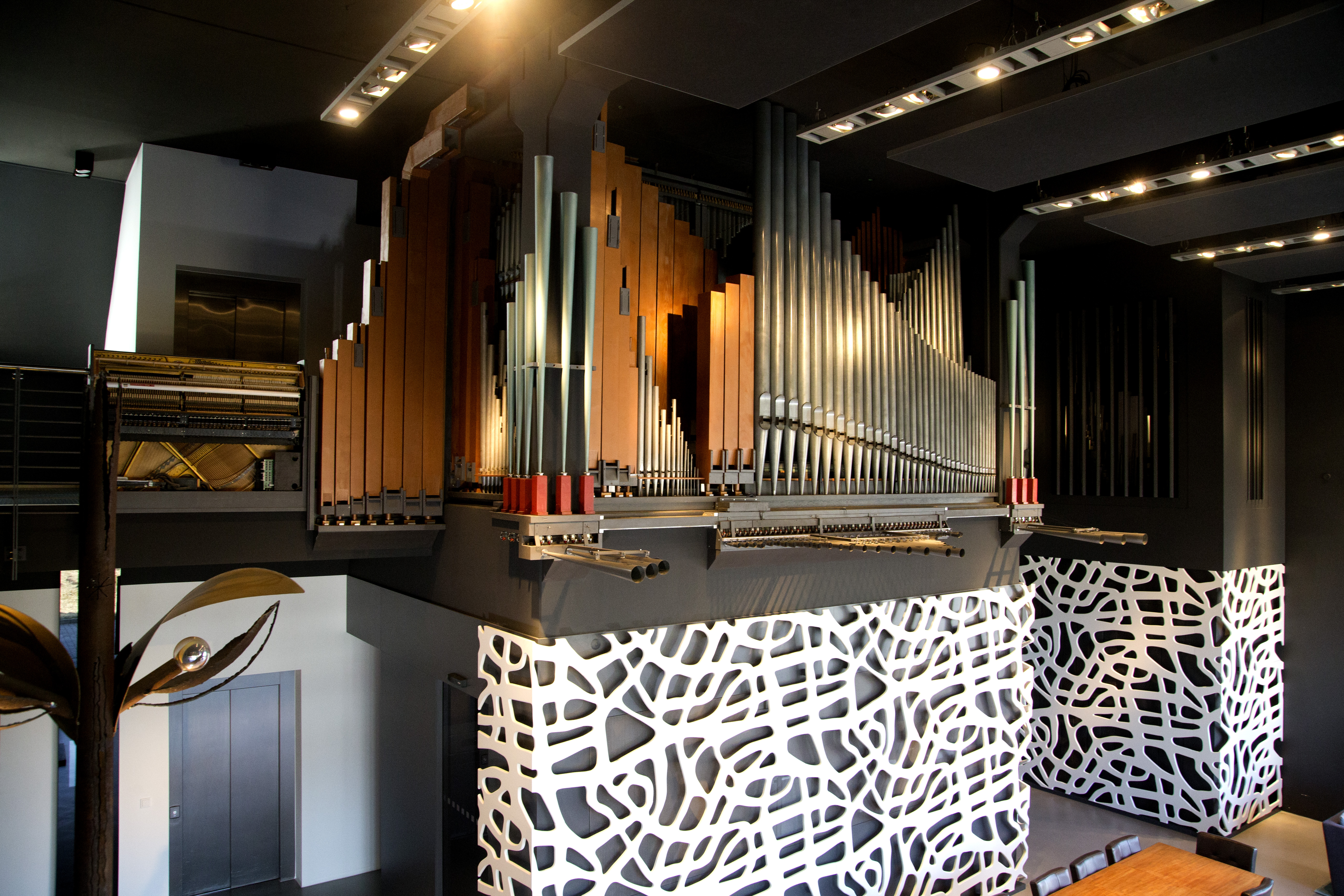 Harder-Völkmann-Orgel im Stockwerk Gröbenzell - Orgelprospekt Architektonisches Konzept